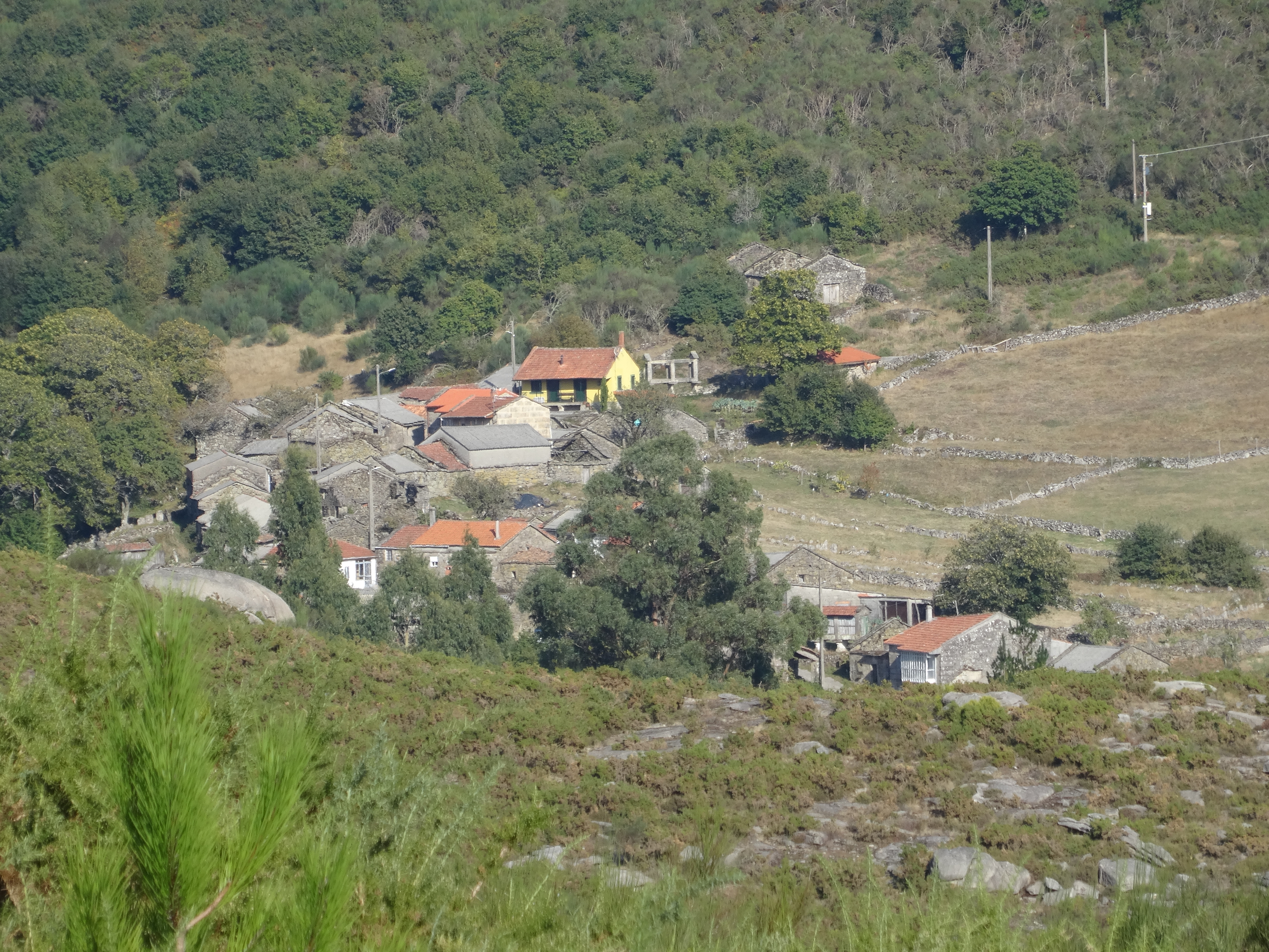 Ver título.